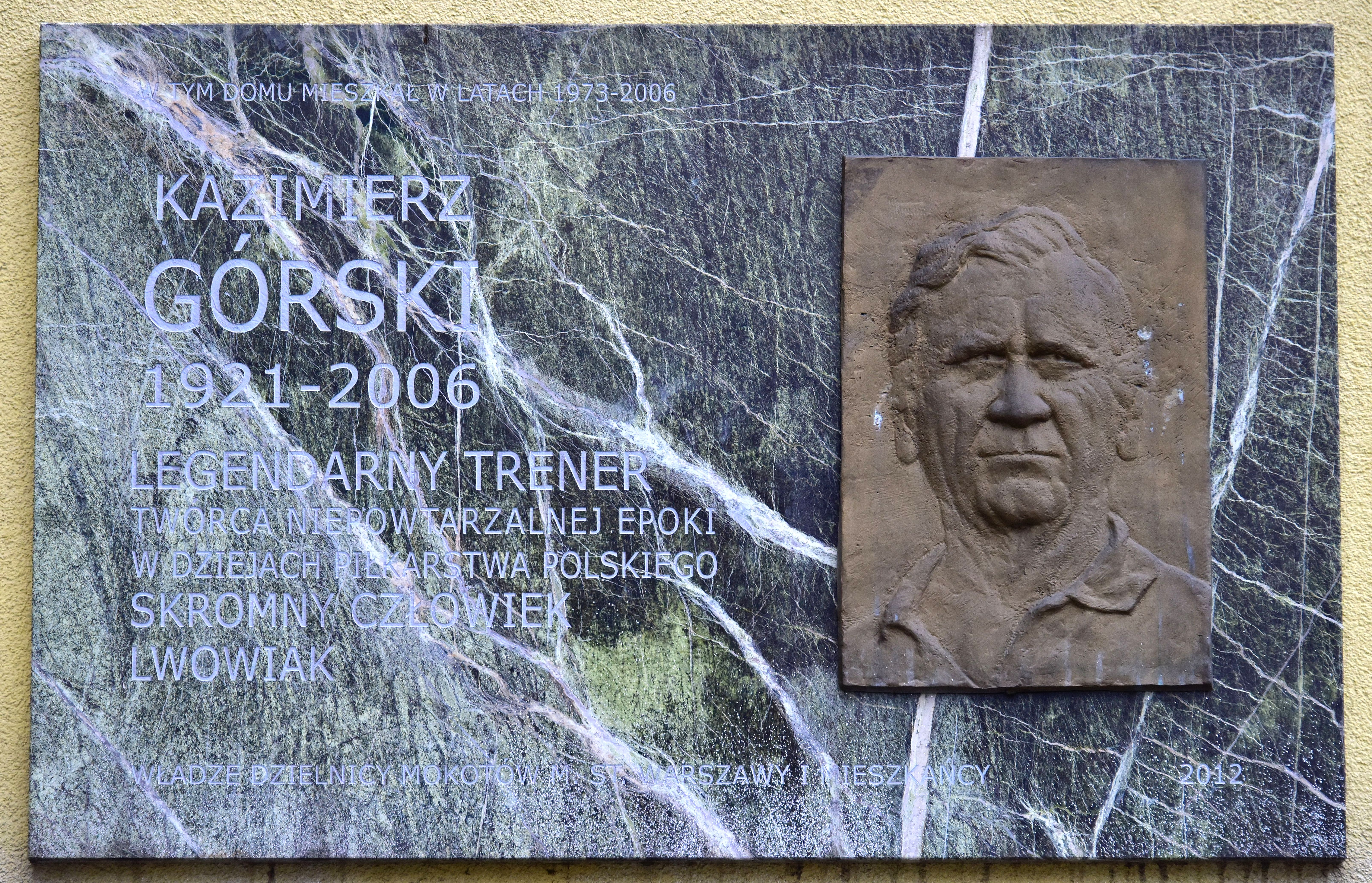 Tablica upamiętniająca Kazimierza Górskiego przy ul. Madalińskiego 49/51 w Warszawie